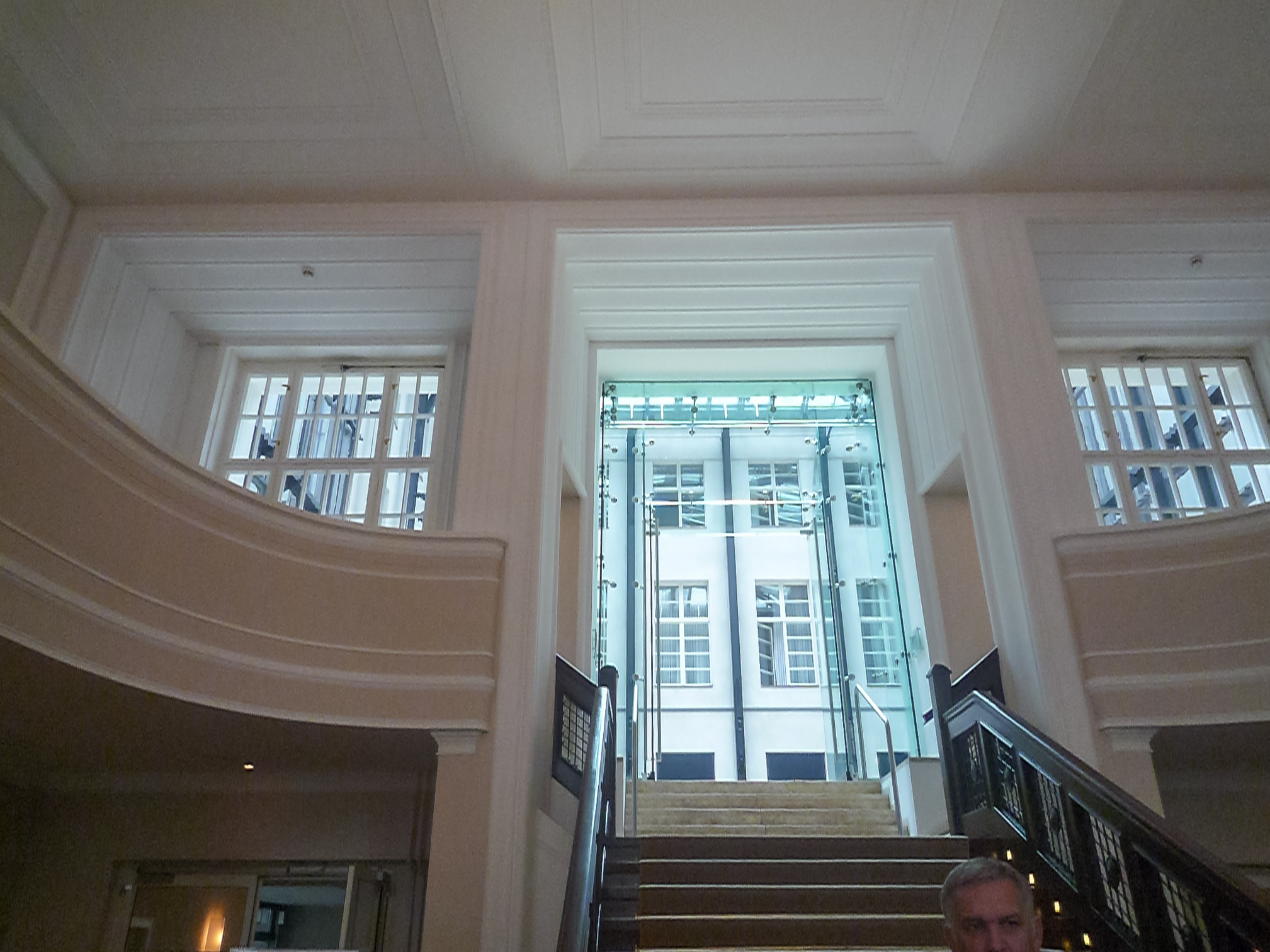 Foyer und Treppenaufgang in der Vertretung des Freistaates Bayern beim Bund, Behrenstraße 21/22, Berlin.